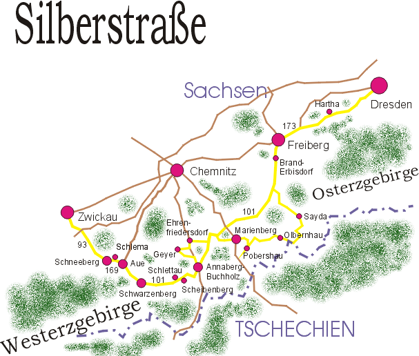 Karte der Silberstraße im Erzgebirge, Sachsen, Deutschland